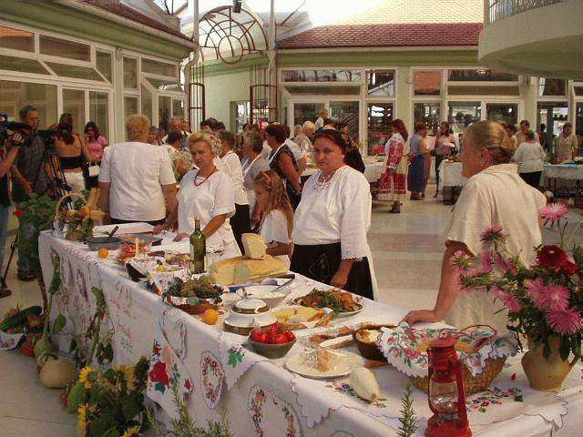 Kaj su jeli naši stari, priredba iz 2003.g., turistički posjet priredbi 2003.g.